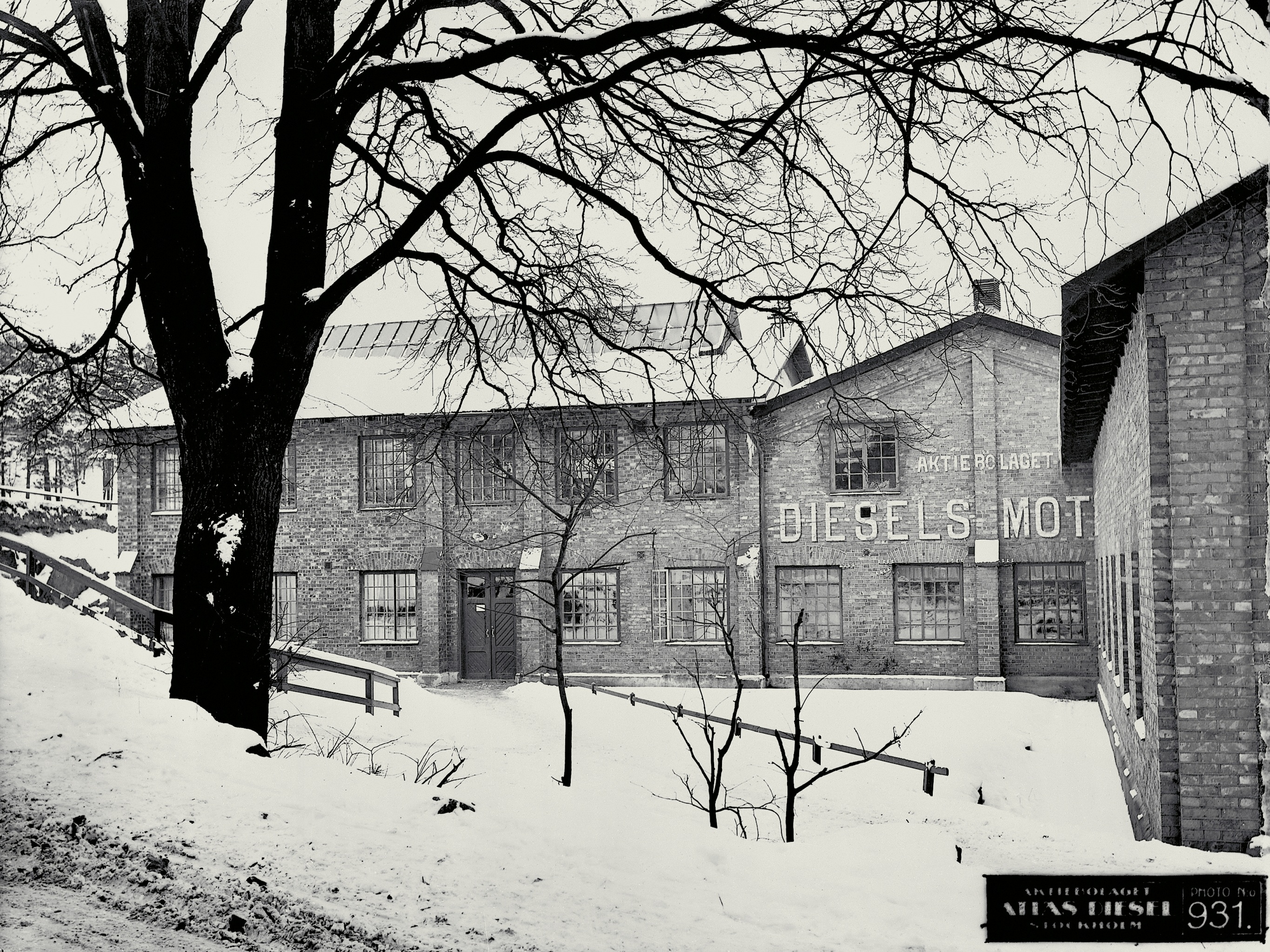 AB Diesels Motorers första verkstadsbyggnad i Sickla